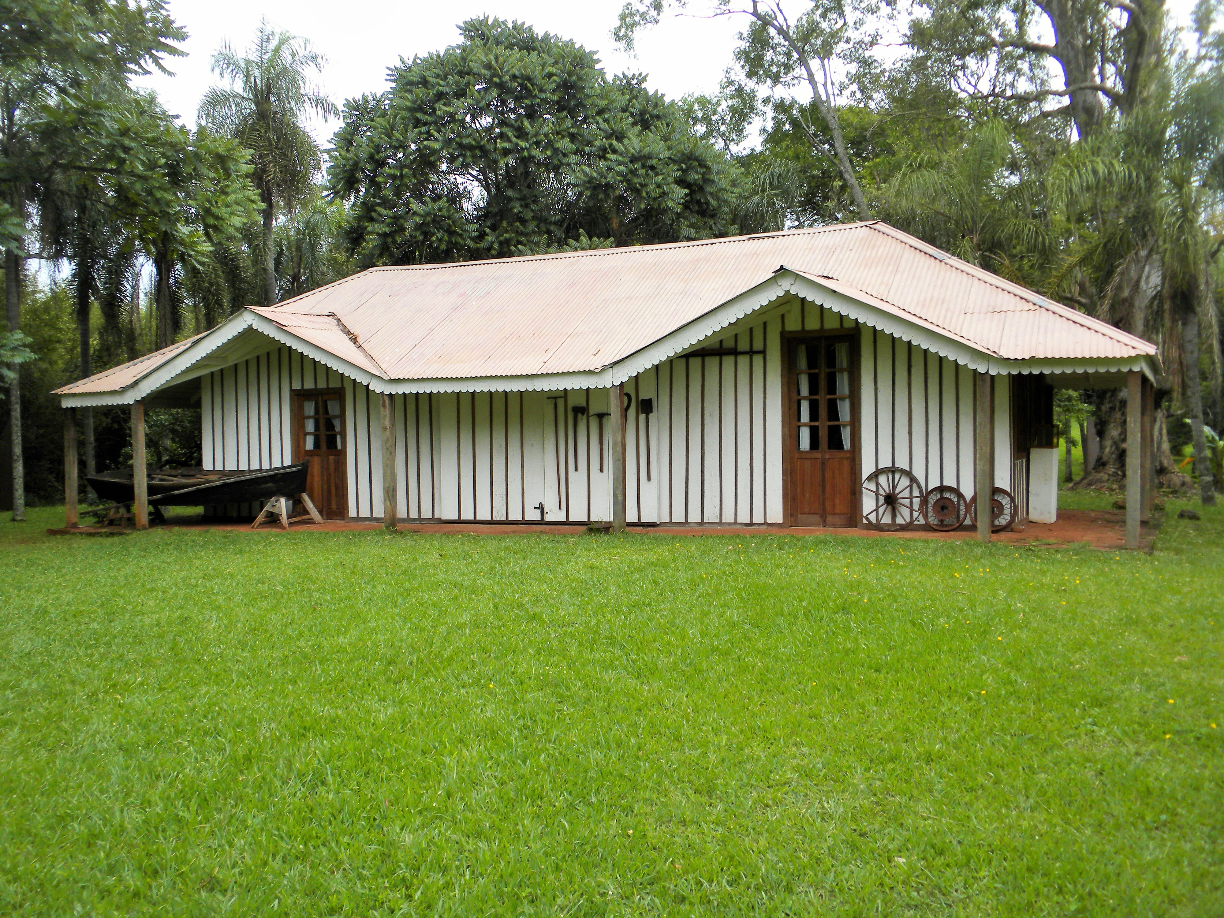 Museo Provincial y Casa de Horacio Quiroga en San Ignacio, Provincia de Misiones, Argentina. Fuenteː Periodista Horacio Cambeiro.